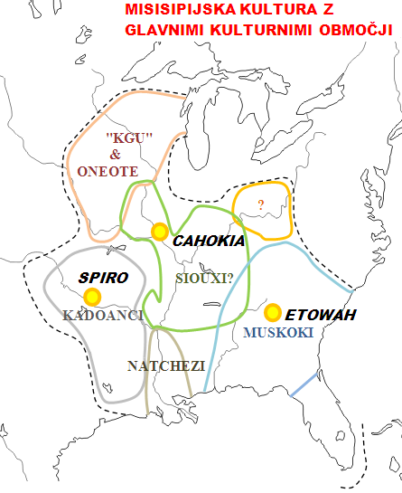 Obseg Misisipijske kulture in njena lokalna območja.